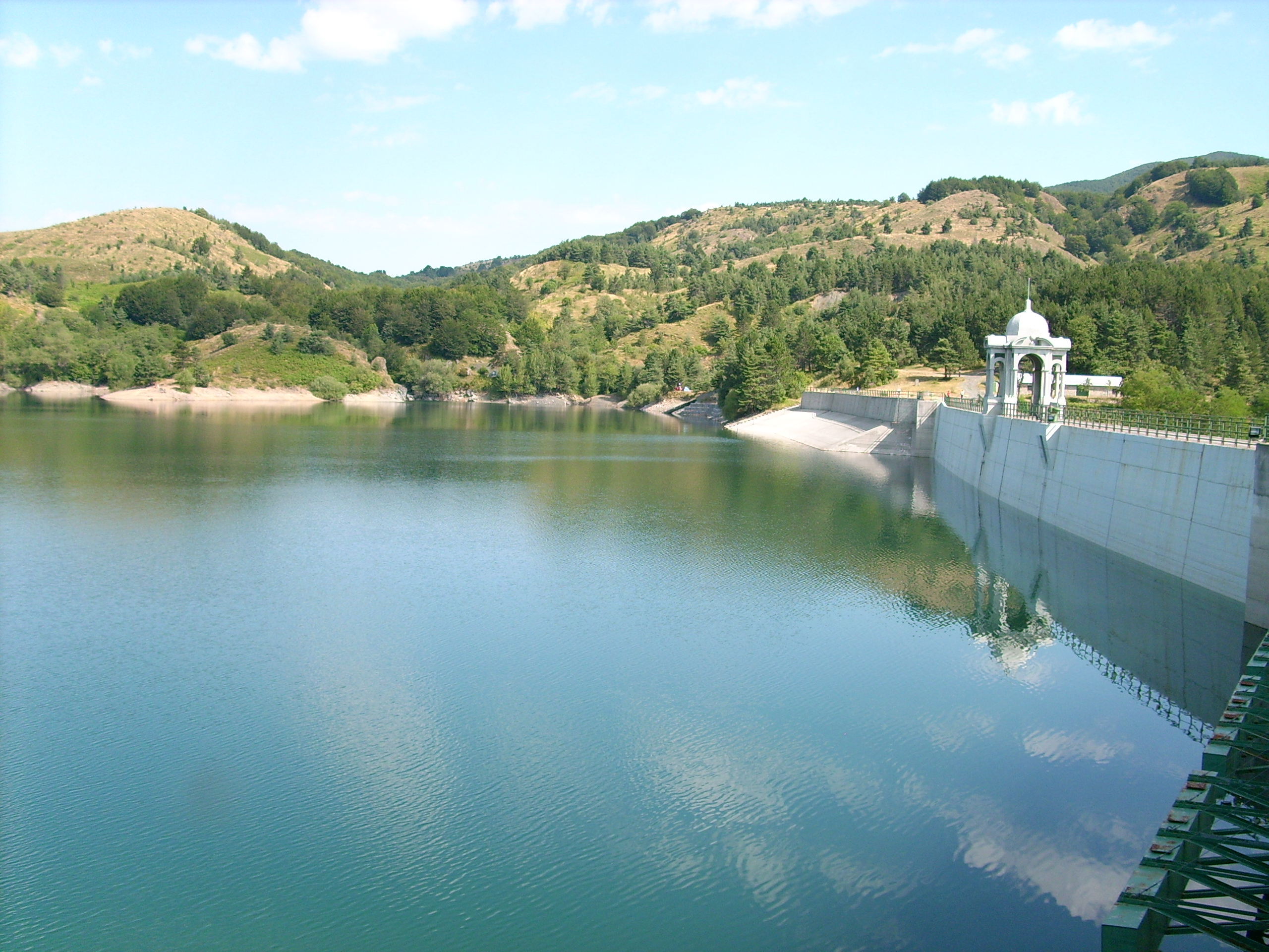 Lago artificiale di Giacopiane presso Borzonasca, Liguria, Italia